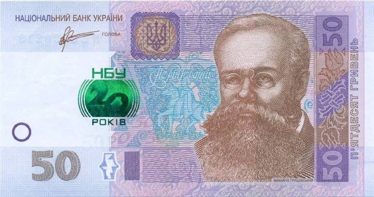 Пам'ятна банкнота номіналом 50 гривень зразка 2004 року (2011), аверс